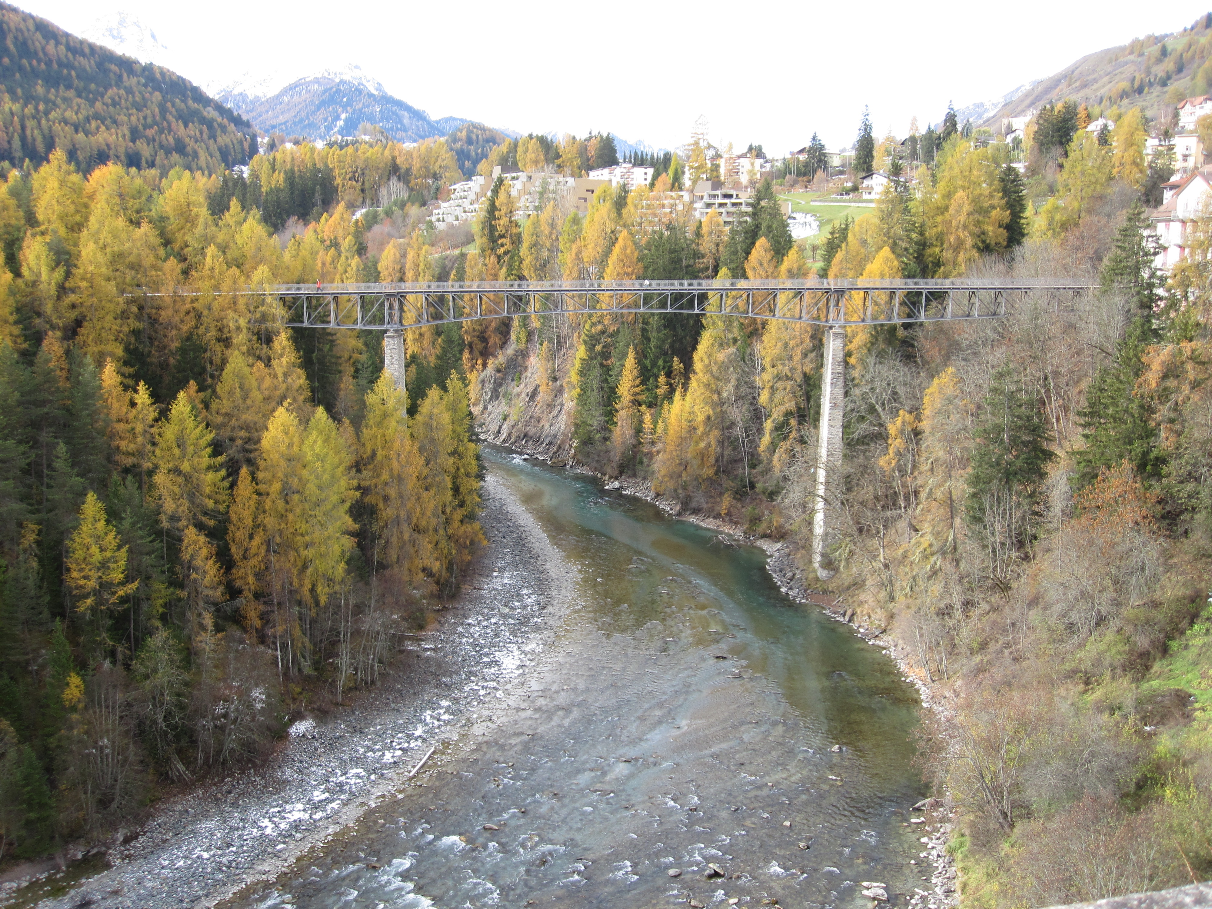 Gurlainabrücke in Scuol (Kanton Graubünden)